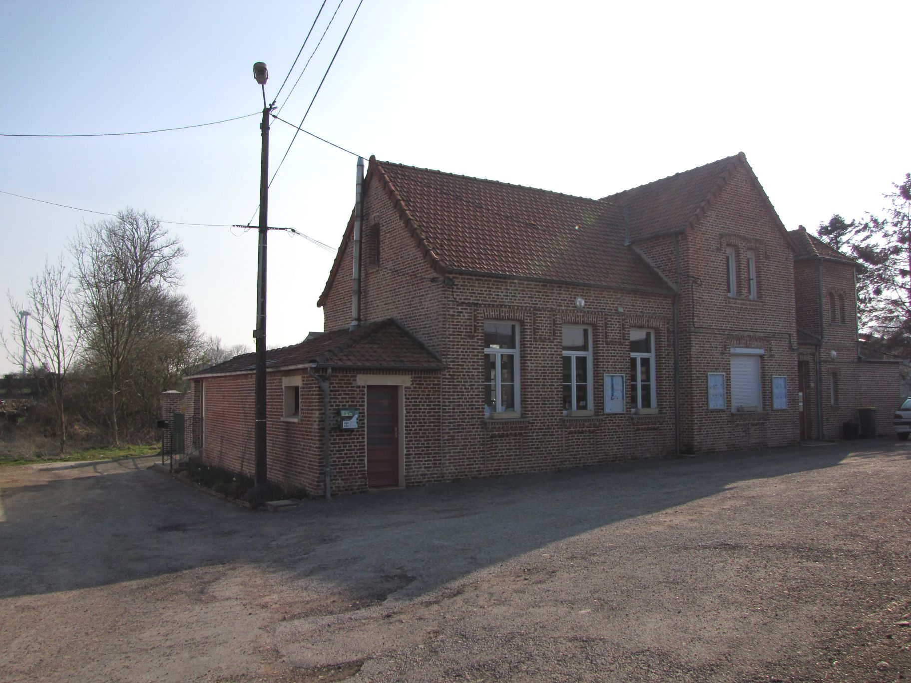 Mairie-école de Coupelle-Neuve